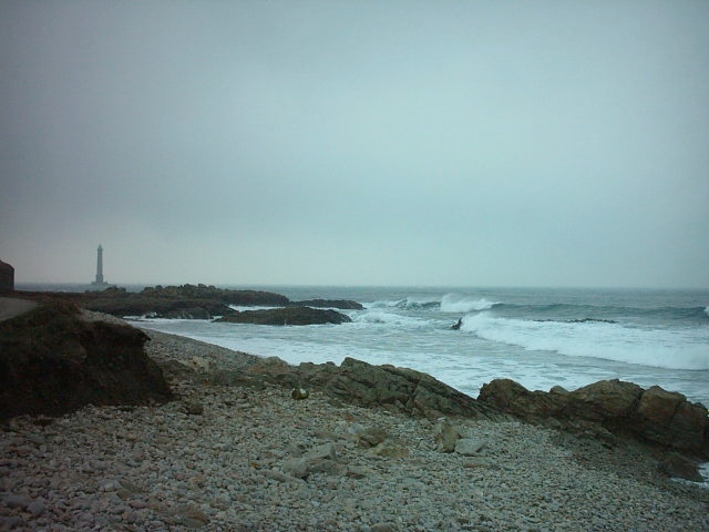 Lieu : Cotentin (Normandie/France) Phare de La Hague